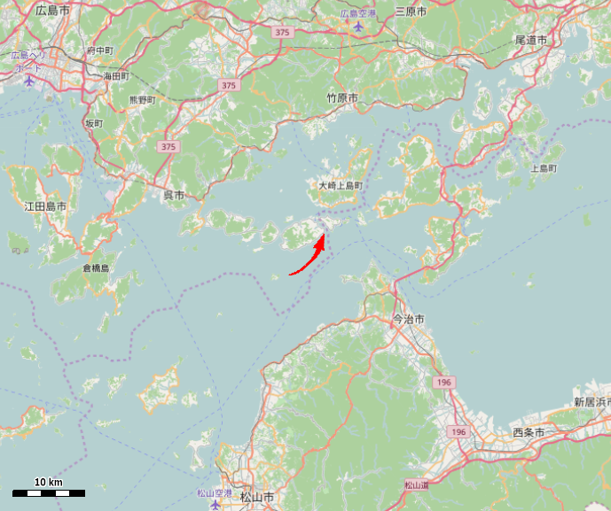 2016年現在の広島県呉市御手洗地区 This map may be incomplete, and may contain errors. Don't rely solely on it for navigation.